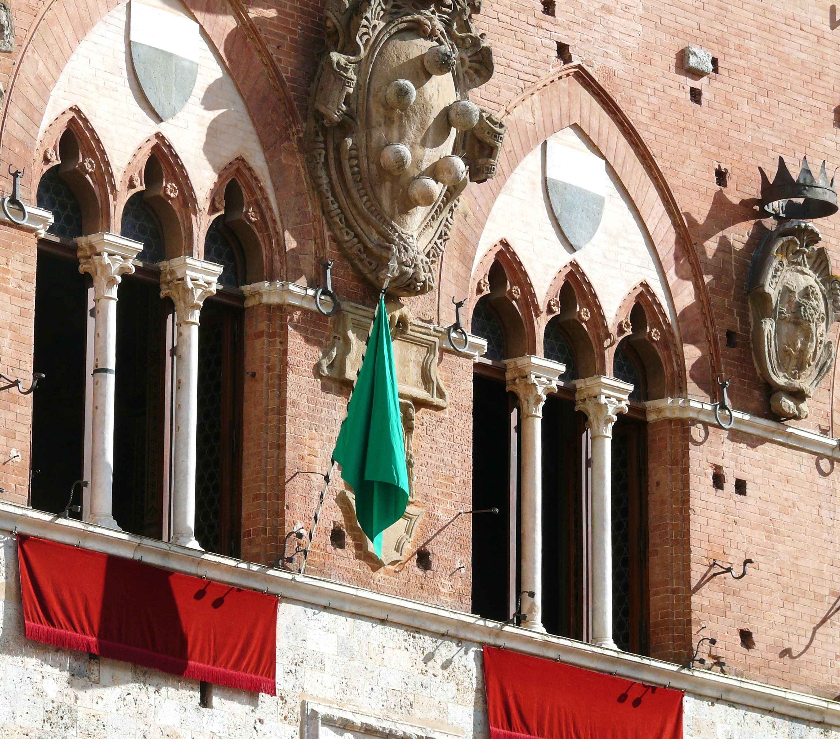 bandiera verde alla finestra del palazzo pubblico, indica che la competizione è rimandata